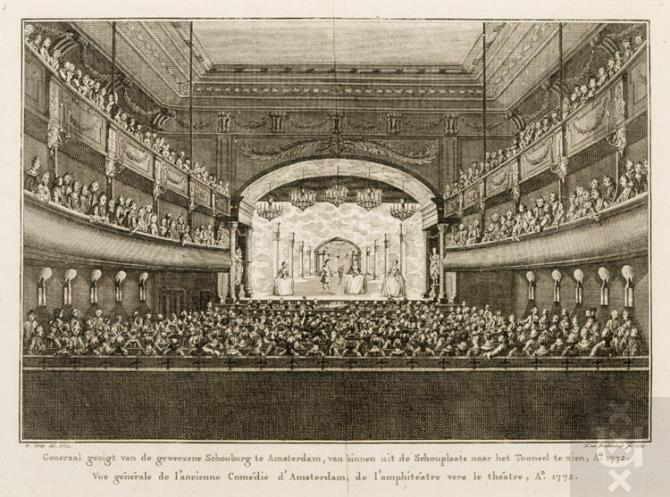 Schouwburg interieur